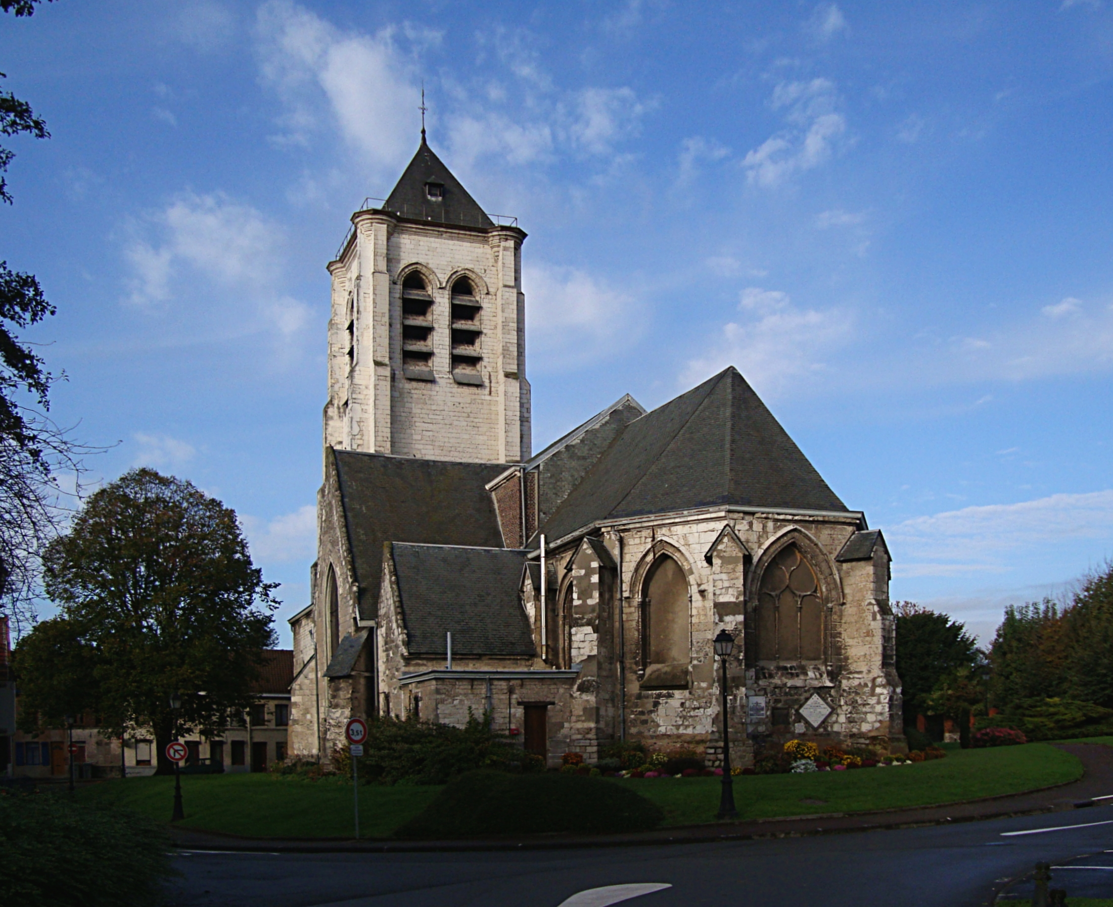 L'église Saint-Pierre du quartier de Flers à Villeneuve-d'Ascq (Nord). Construite en pierre de taille au milieu du XVIème siècle dans le style gothique, l'église a été remaniée vers 1850 par l'architecte Charles Marteau.